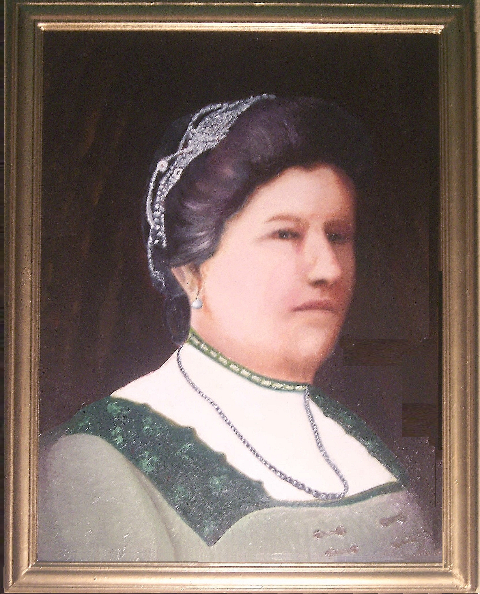 StefanievonTuretzky